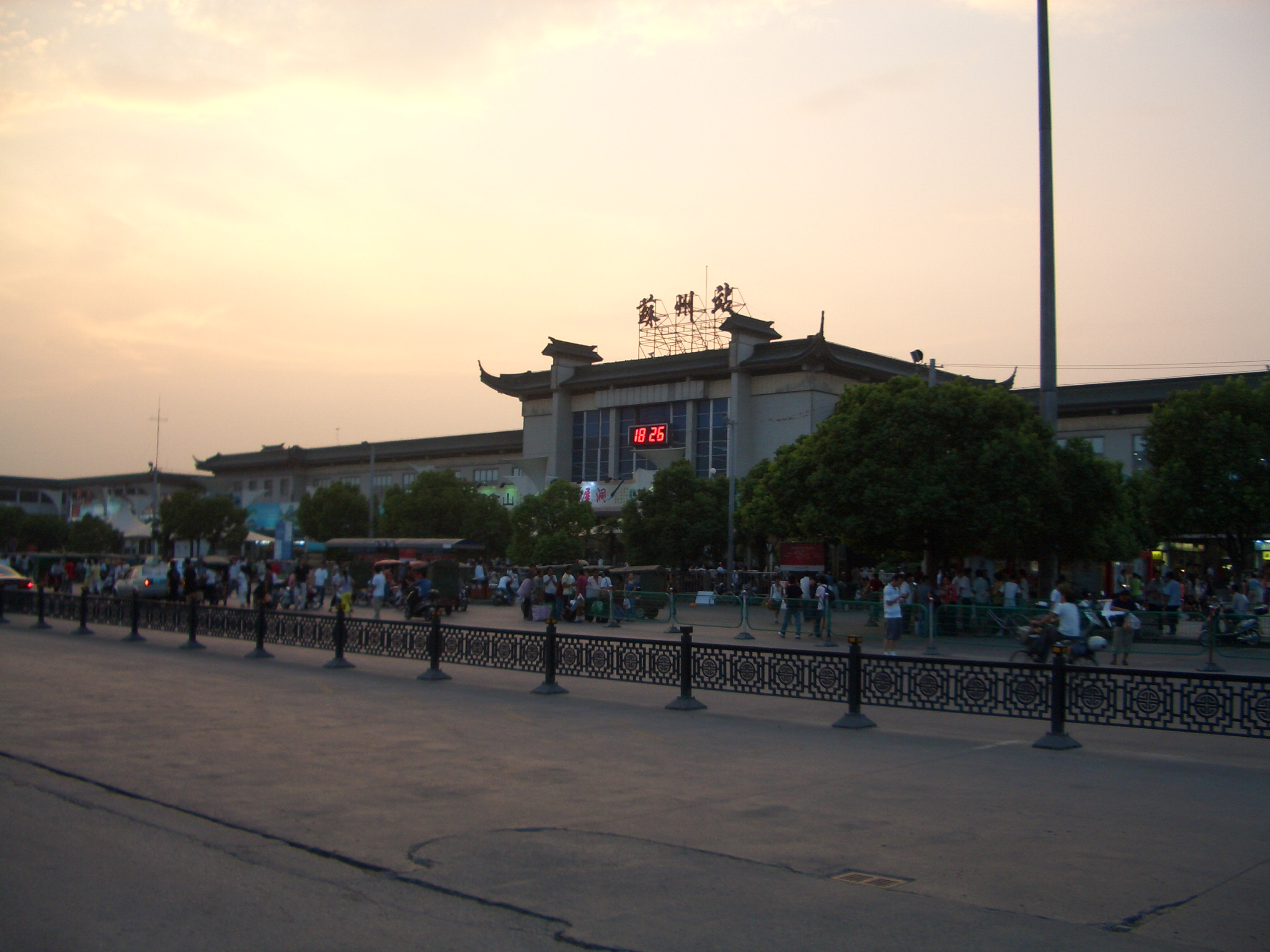 苏州火车站改造前的样子